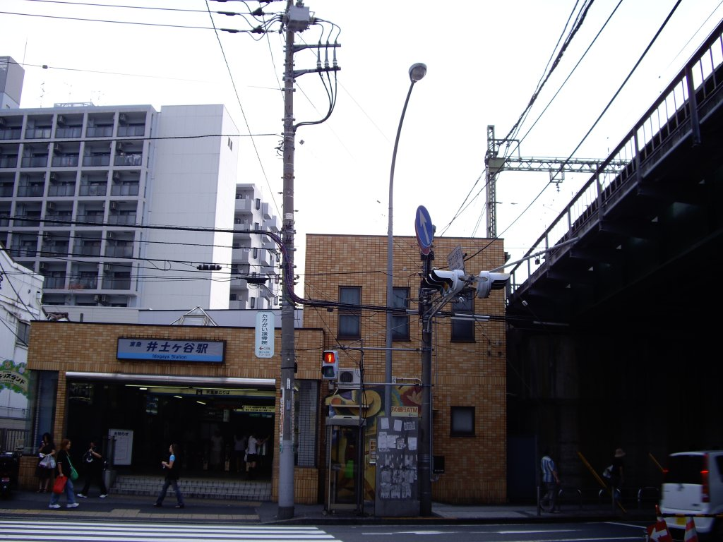 Exit of Idogaya Station, Keikyū Main Line, Minami-ku, Yokohama, Kanagawa Japan